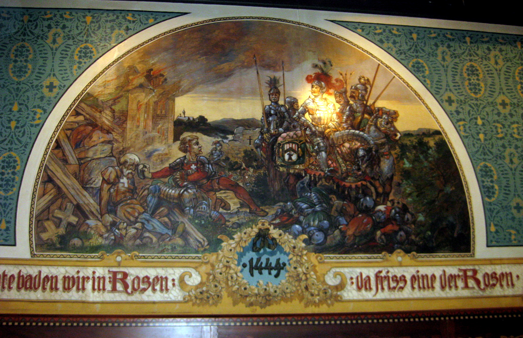 Münchenstein Trotte Wandmalereie Rosen